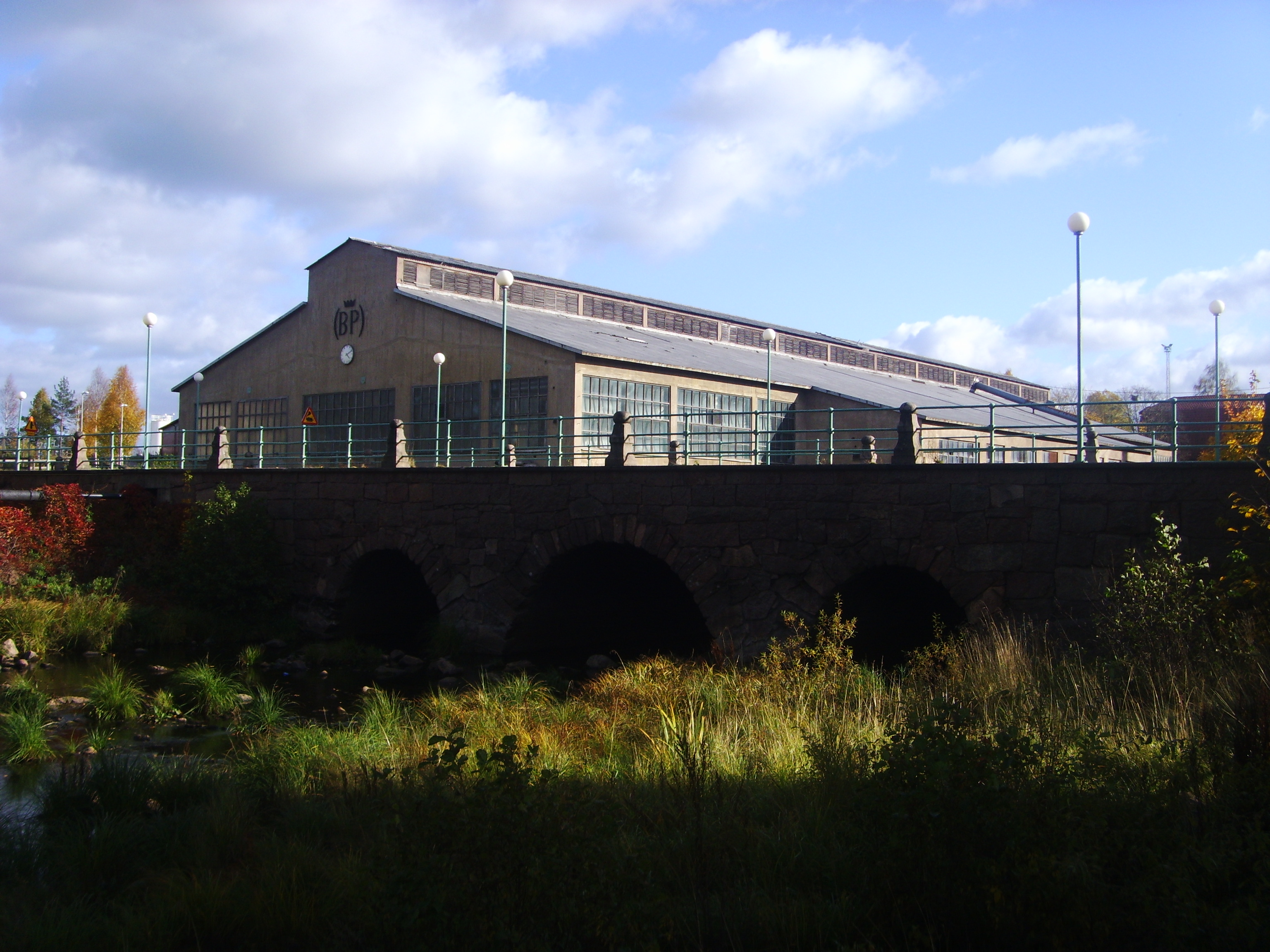 Bruksområdet i Boxholm.